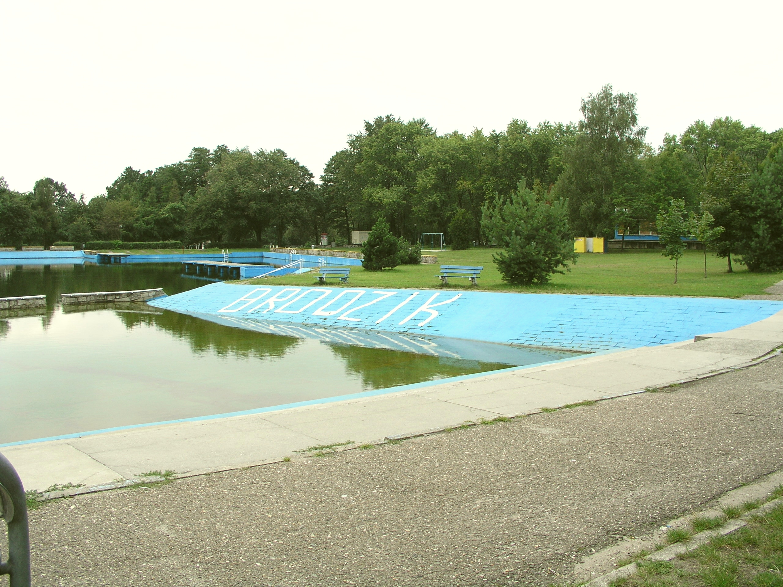 Pohled na park sportu a rekreace v Rybniku-Kamieńi, Polsko Beschreibung: MOSiR (Miejski Ośrodek Sportu i Rekreacji) in Rybnik (Ortsteil: Kamień), Polen Quelle: selbst erstellt Datum: 11.08.2005 / 13:24:22 Autor: Paul Wenk